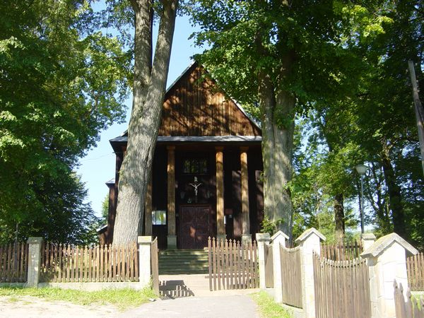 Czarna (powiat bieszczadzki) - cerkiew